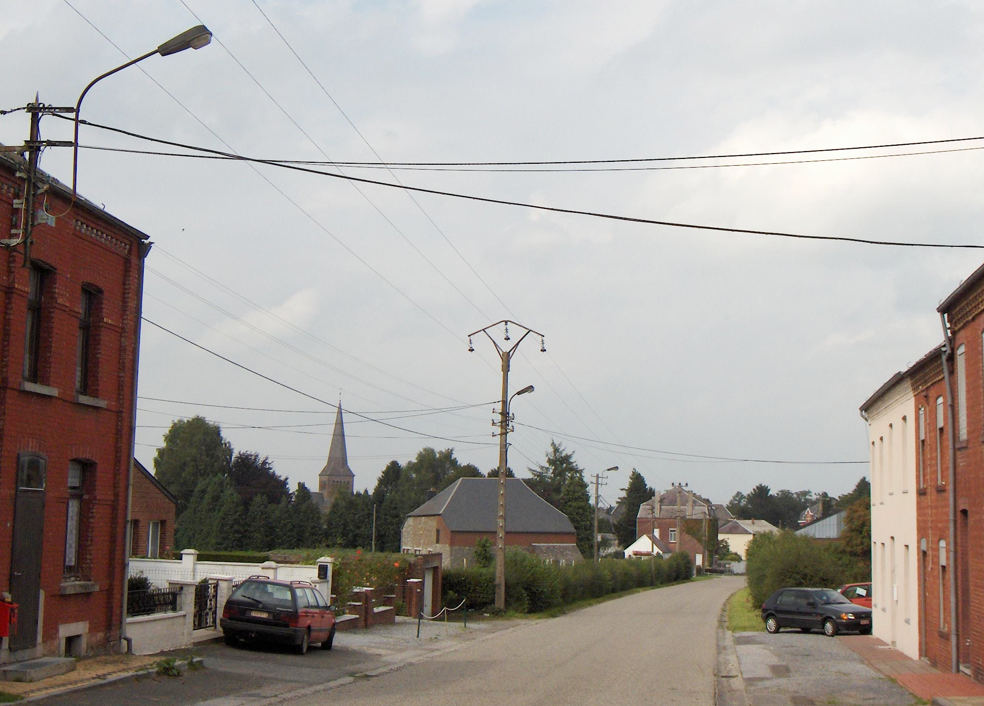 Bourlers (Ortsteil der Gemeinde Chimay, Prov. Hennegau, Belgien), Überblick von der rue des Trappistes